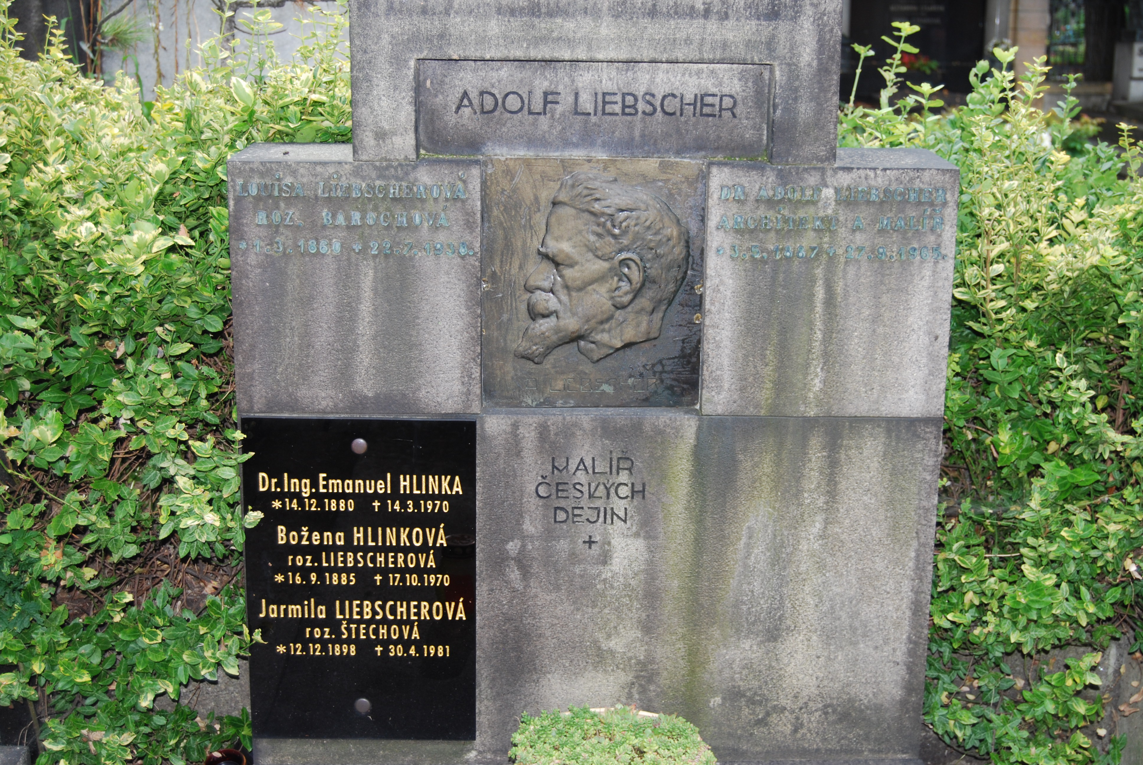 Jednotlivé náhrobky. Slavín (hrobka). Vyšehradský hřbitov. Praha. Česká republika